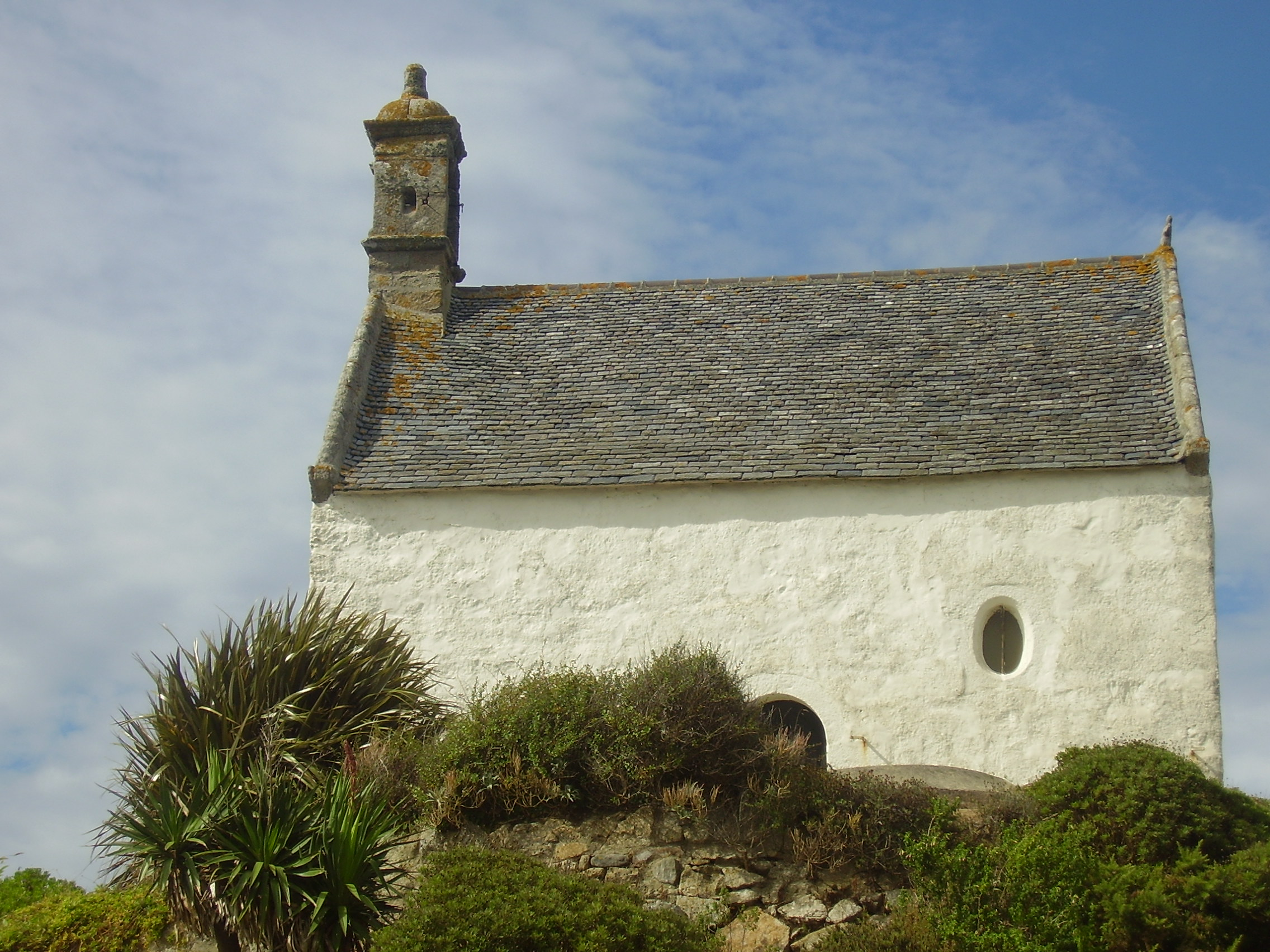 Roscoff, Bretagne; Frankreich